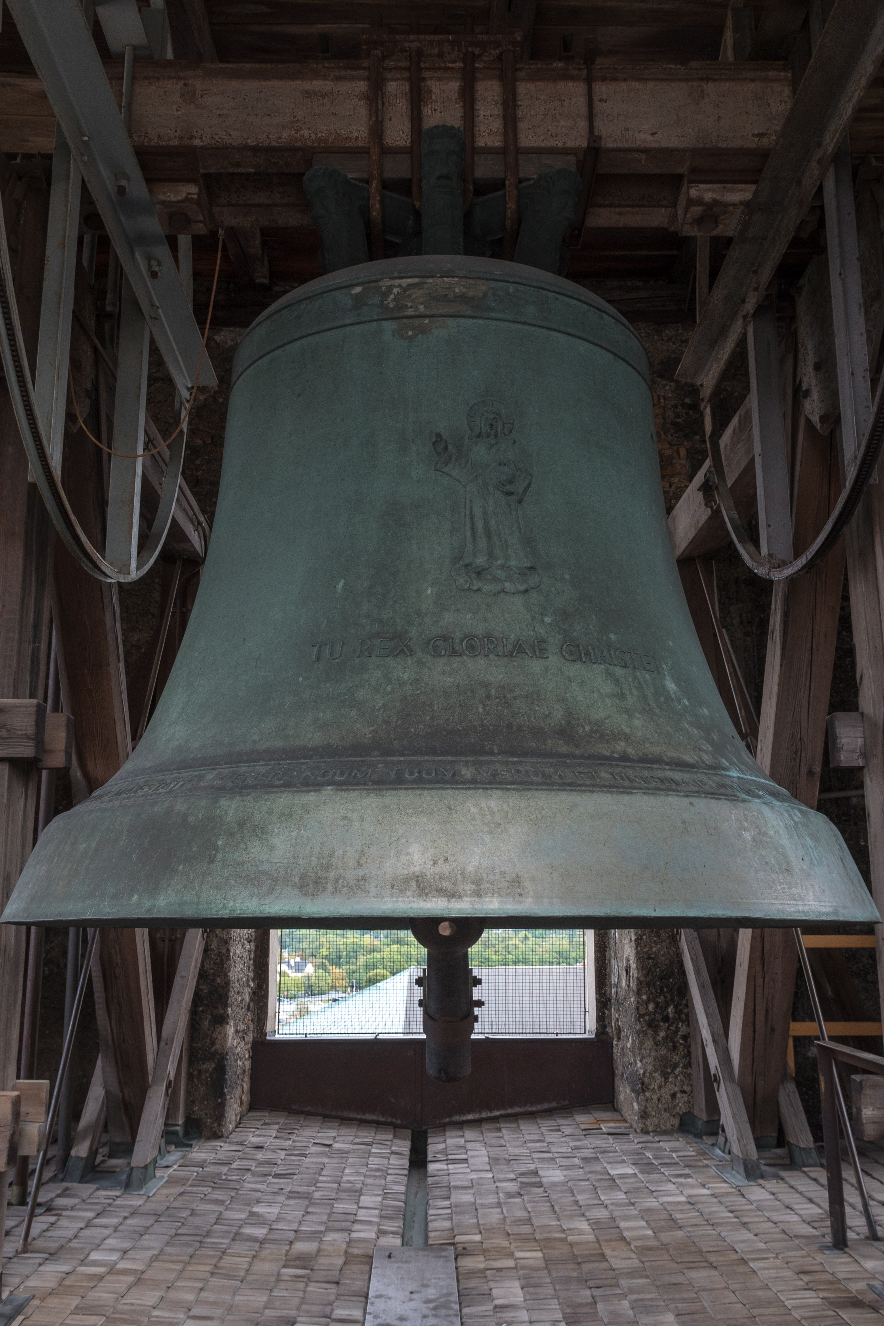 Salvatorglocke, Salzburger Dom, Zugang durch Führung des Dommesners